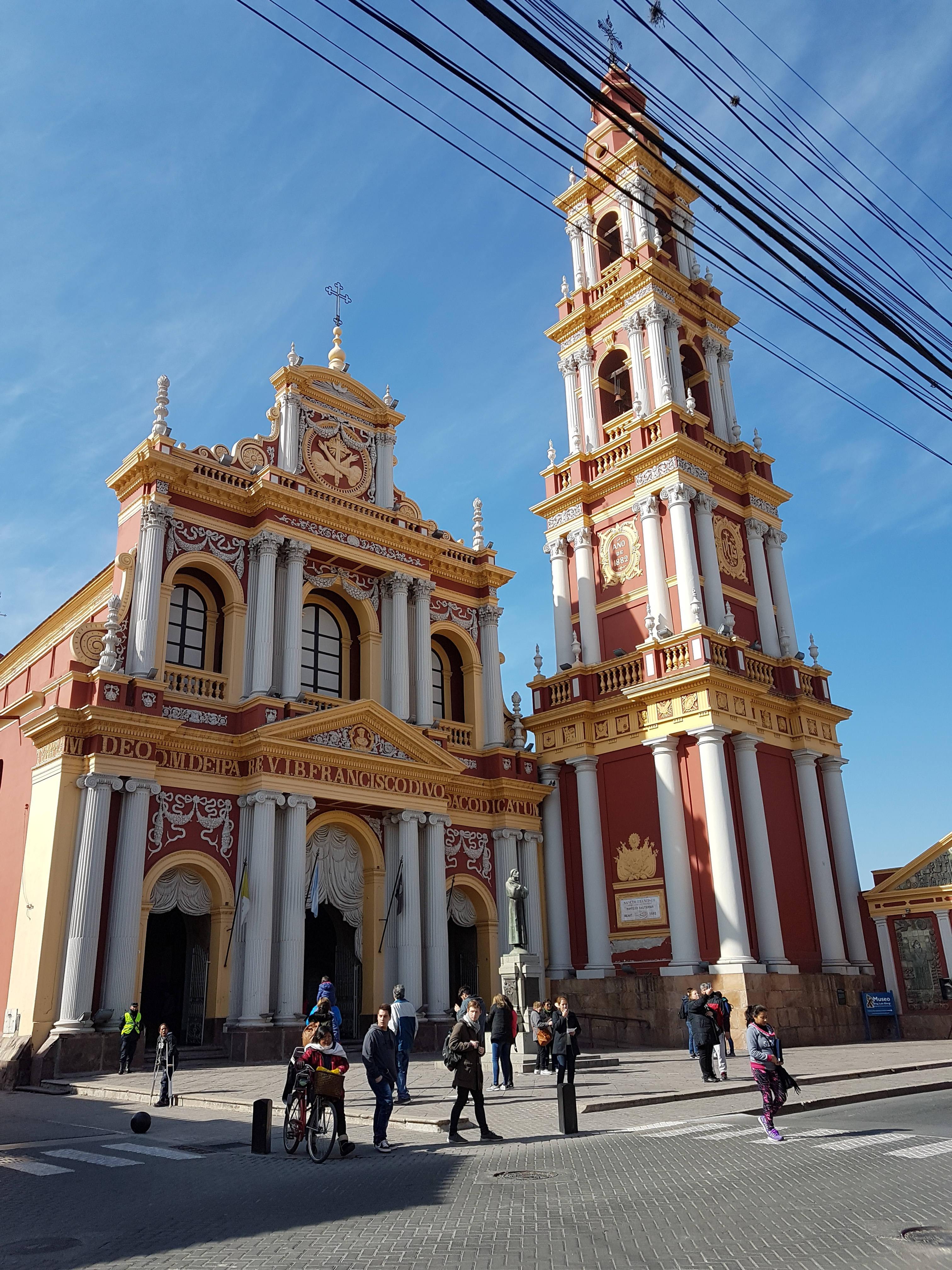 La Basílica Menor y Convento San Francisco, construidos en el mismo lugar que el fundador de Salta, don Hernando de Lerma le asignó en el Acta de Fundación, el 16 de abril de 1582. Junto al Convento San Bernardo, la casa de Uriburu y el Cabildo, integran el corredor histórico más importante de la ciudad de Salta. La iglesia es de una sola nave angosta y larga, y las paredes son de piedra, ladrillos gruesos y dobles. La bóveda es real y media naranja. Muchos de los retablos eran de mampostería y otros de madera pintada y dorada. El 14 de julio de 1941, Iglesia y Convento San Francisco fueron declarados Monumentos Históricos Nacionales y el 4 de agosto de 1992 fue declarada Basílica Menor por la Santa Sede.fachada de Iglesia